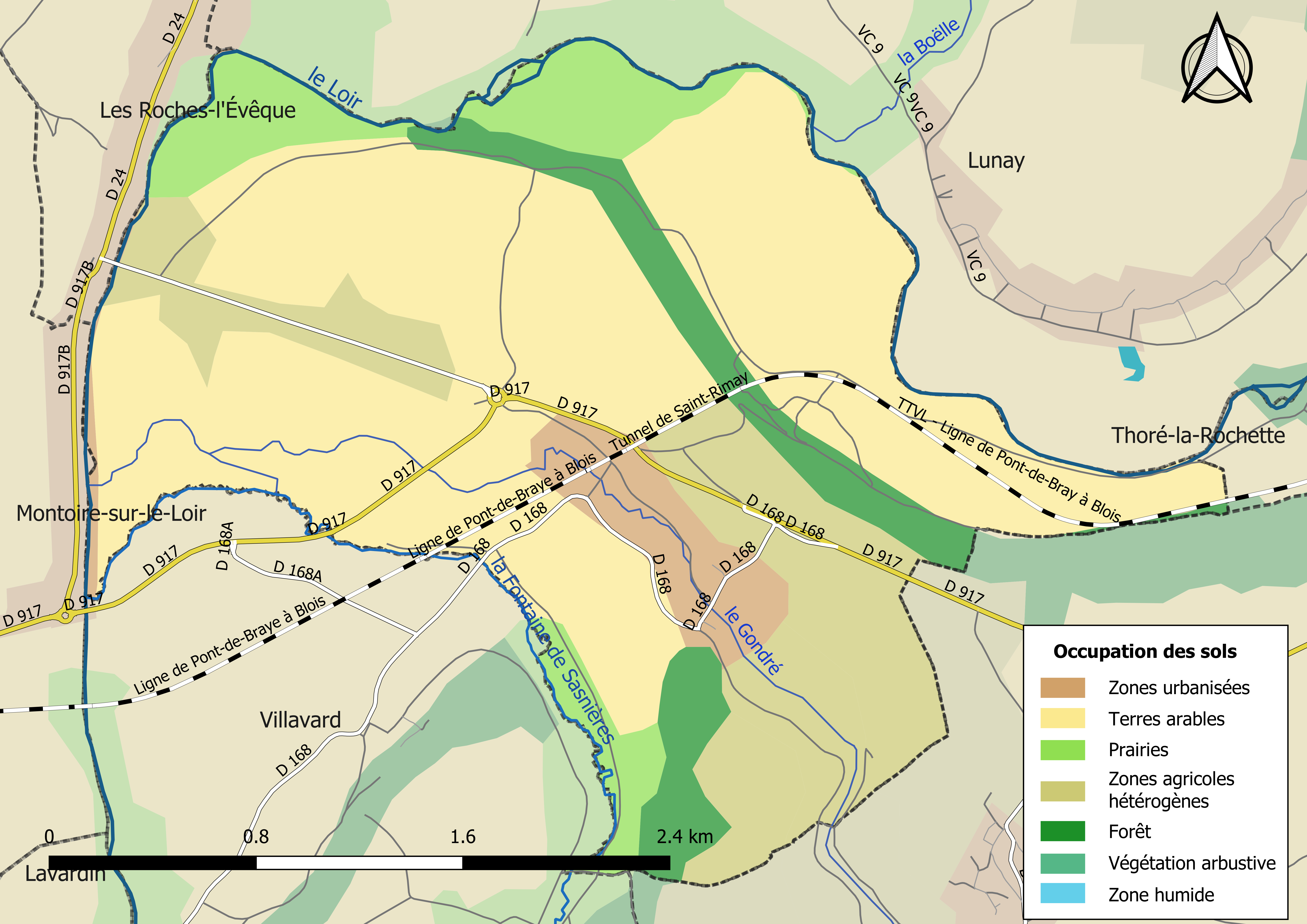 Carte des infrastructures et de l’occupation des sols en 2018 de la commune de Saint-Rimay (France).